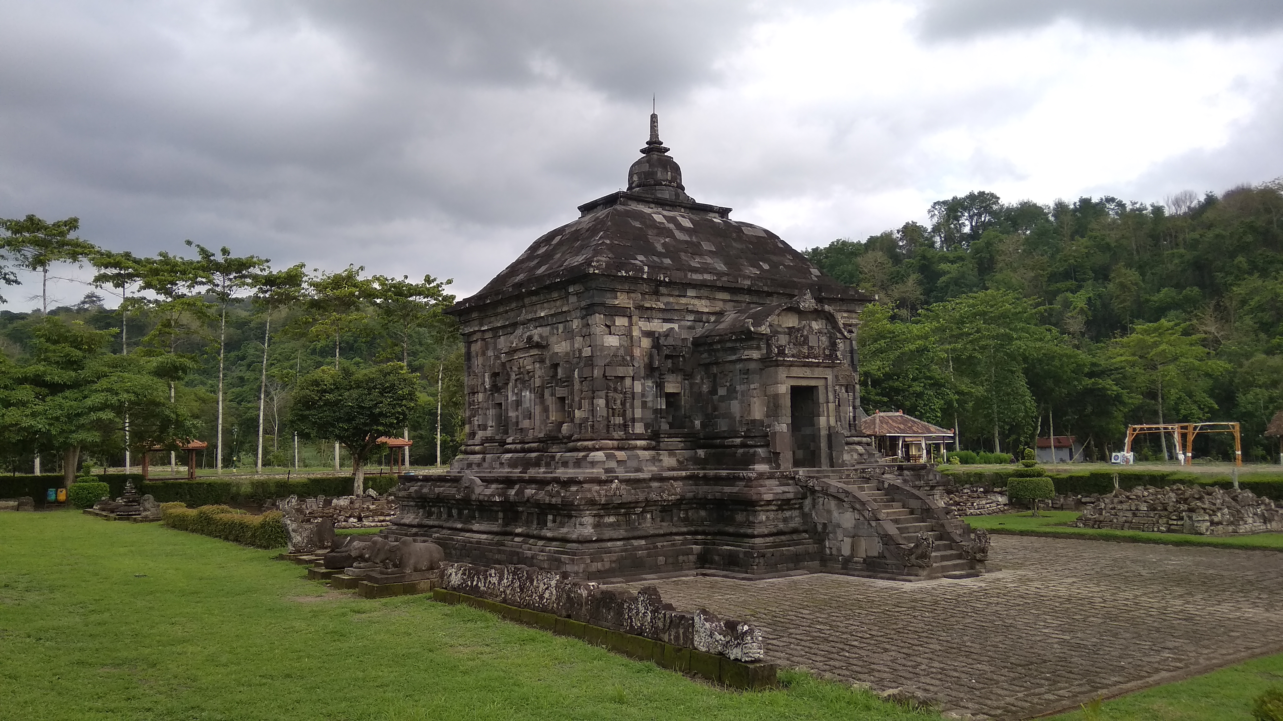 Candi ini adalah candi induk di Kompleks Candi Banyunibo di daerah Prambanan, Daerah Istimewa Yogyakarta. Candi ditemukan tahun 1940 dalam keadaan runtuh.